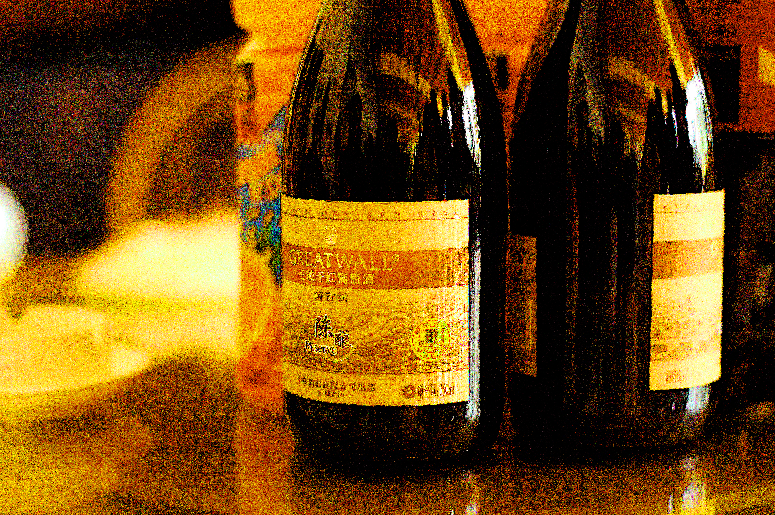 Deux bouteilles de la GreatWall Co 长城